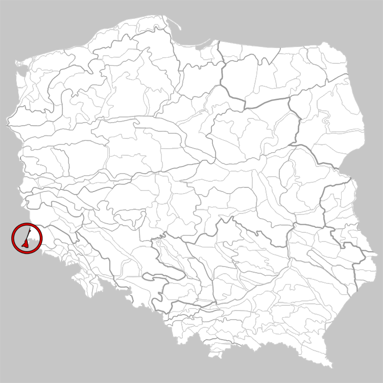 Physico-geographical regionalization of Poland Mezoregion 343.2 Roztochia Regionalizacja fizycznogeograficzna Polski Mezoregion 343.2 Roztocze